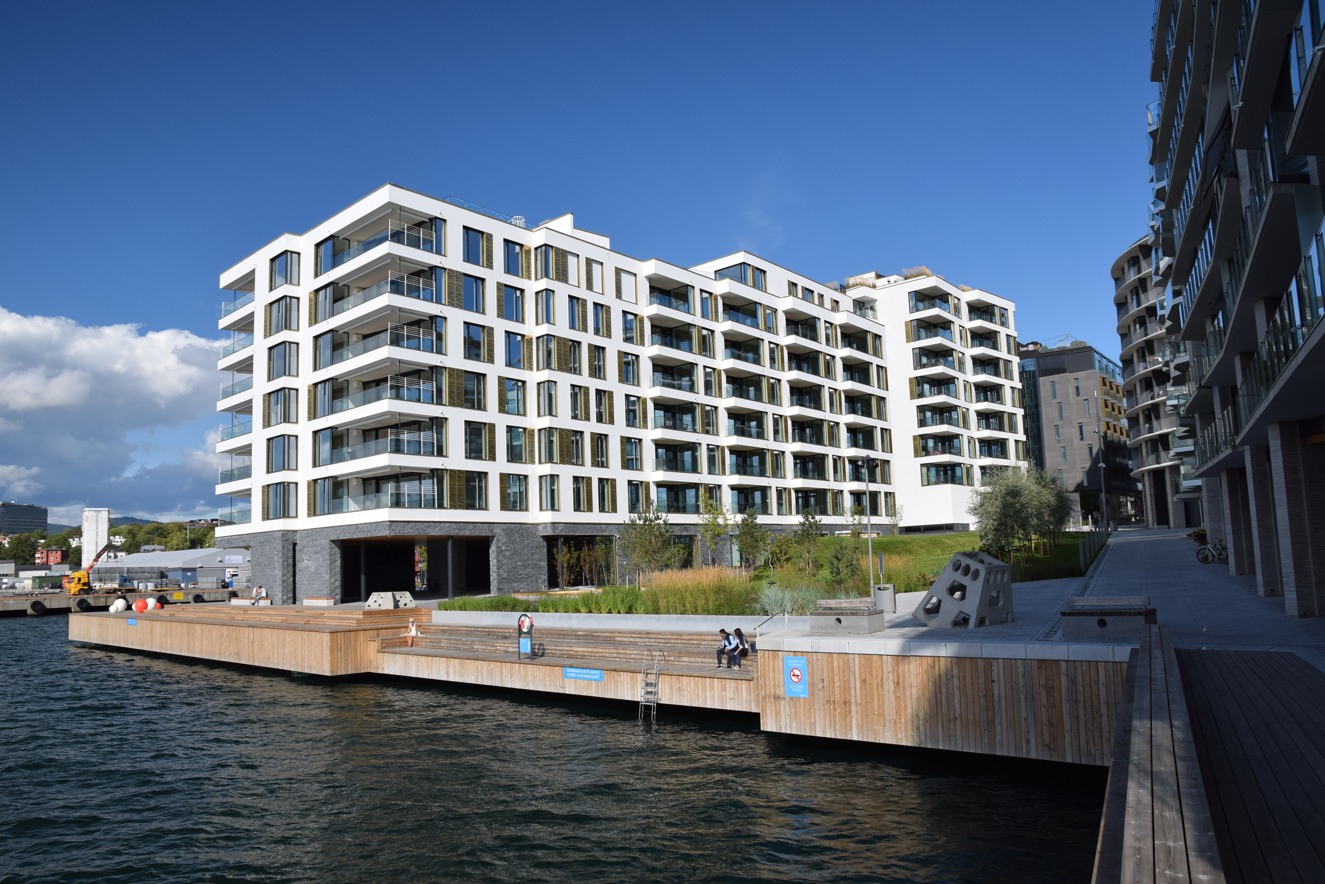 Fru Kroghs brygge, Tjuvholmen, Oslo, sett fra bryggen